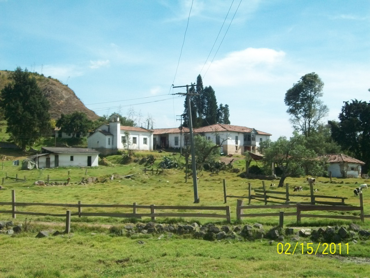 Soacha, Cundinamarca, Colombia